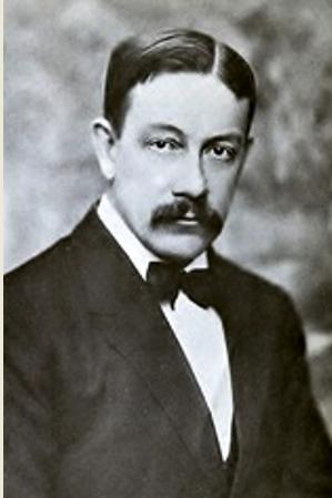 モルガンお雪の夫、ジョージ・デニソン・モルガン。